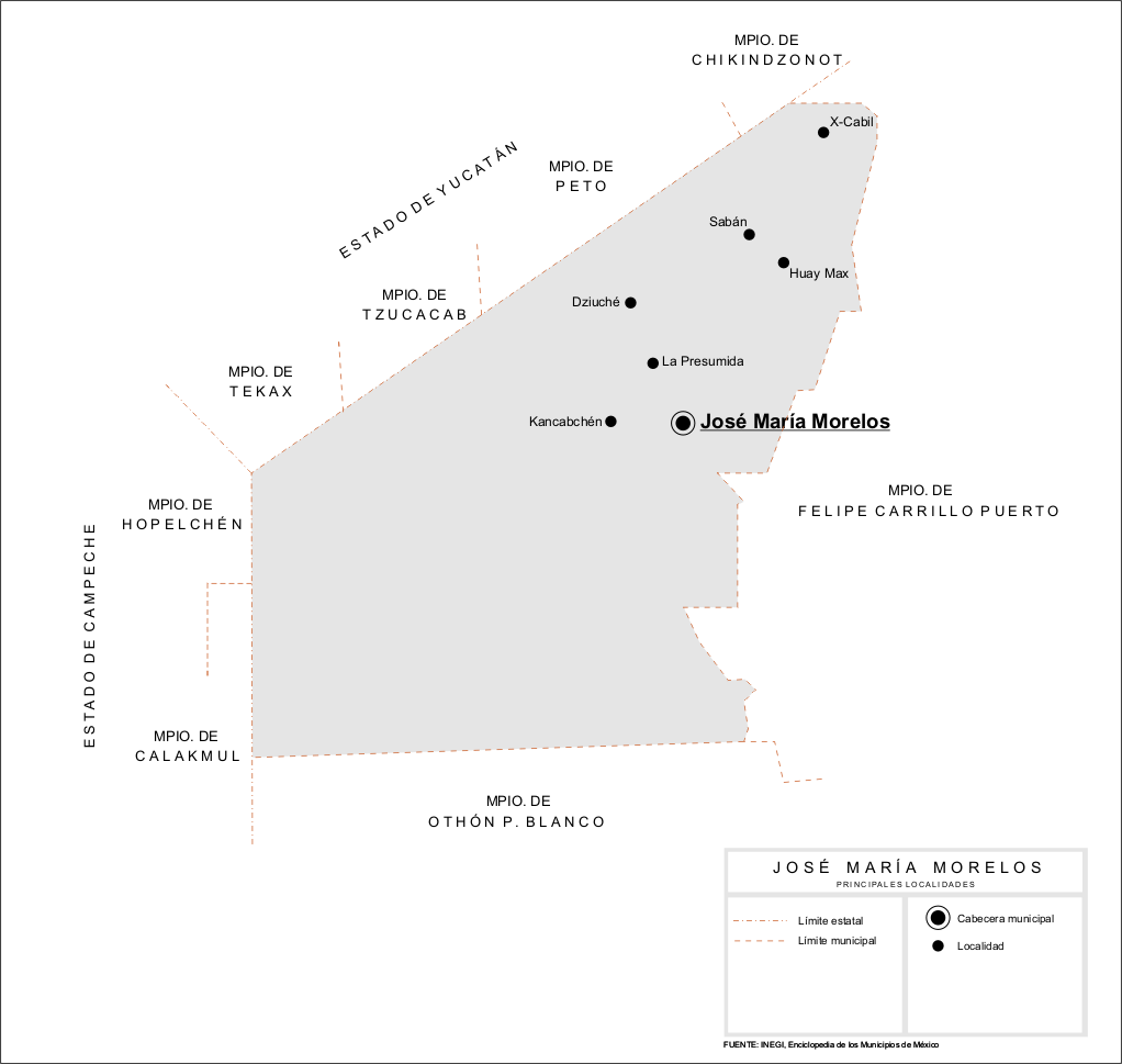 Mapa de las principales localidades del Municipio de José María Morelos en el estado de Quintana Roo, México.